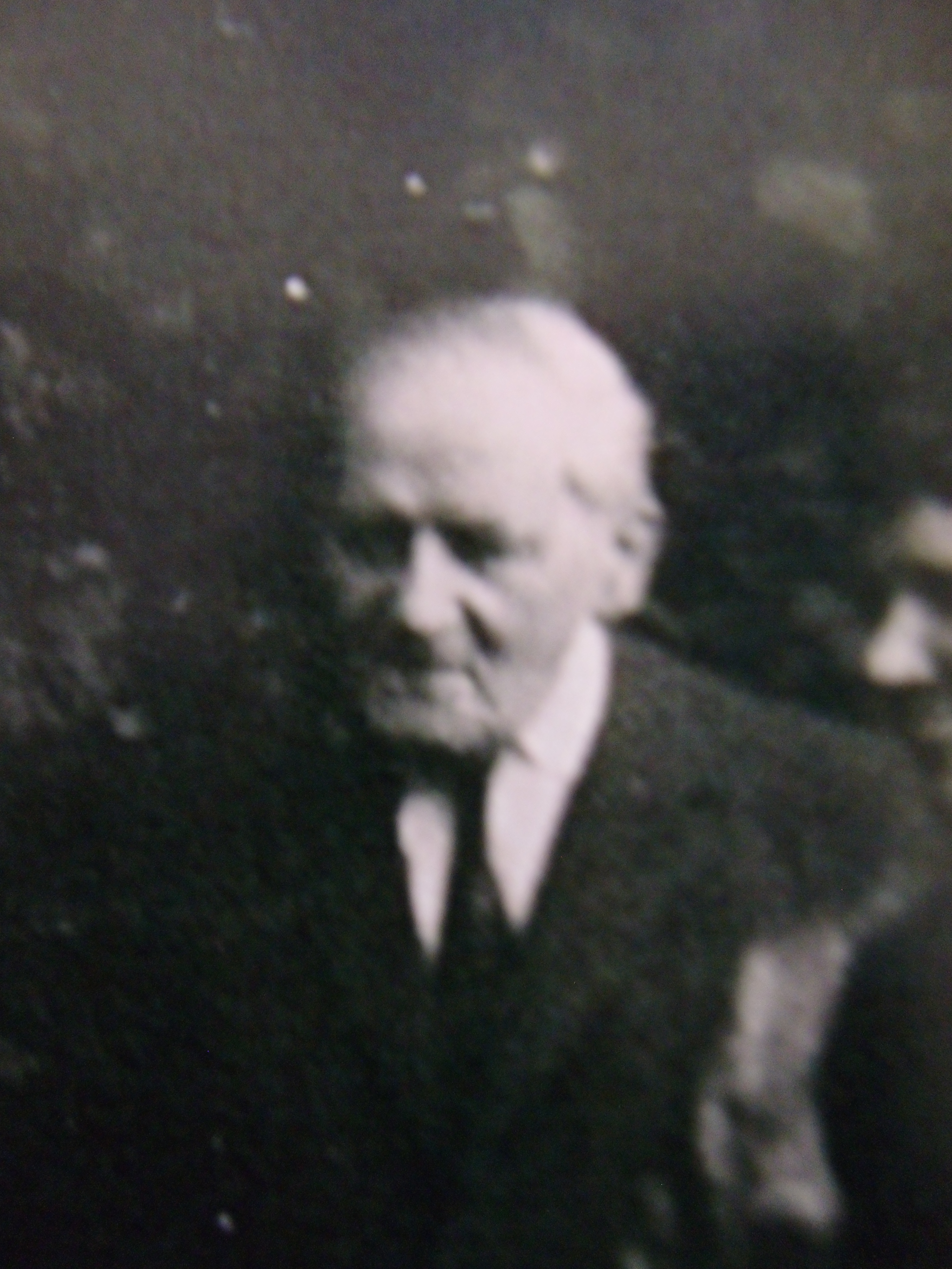 Portrait; Ausschnitt aus einem Familienphoto; Ort: Freiburg im Breisgau, Stadtteil Herdern, Hebsackgut, Sonnhalde